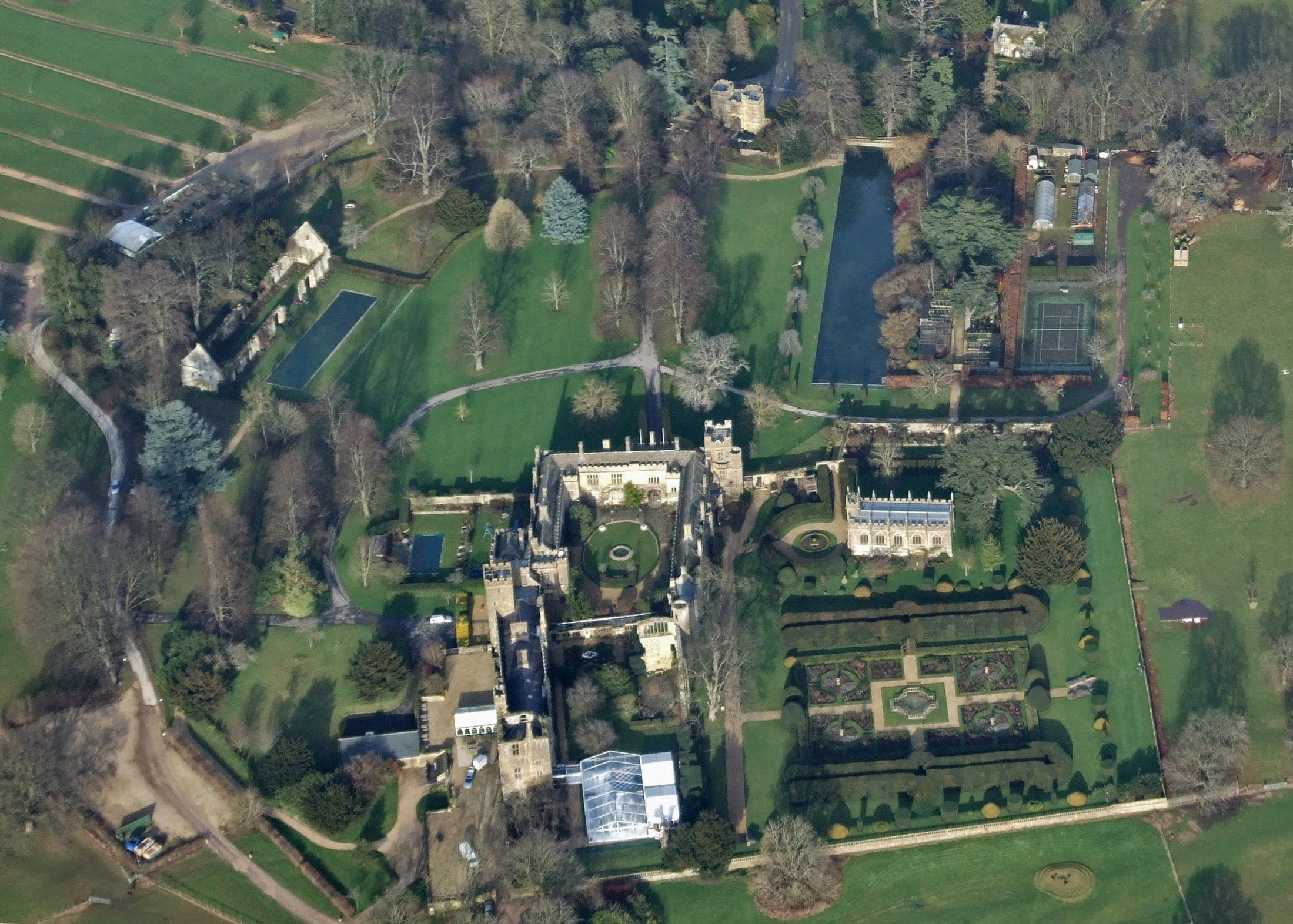 Sudeley Castle, Luftbild des Anwesens